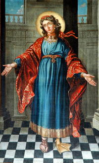 Tableau de Devergnes - 1755 - représentant Sainte Néomadie ou Néomoise